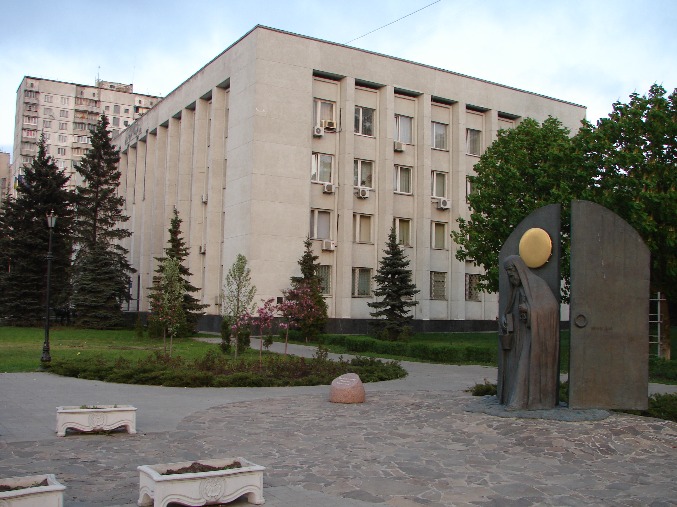 Пам'ятник Миколі Святоші на фоні Святошинської РДА (Київ)